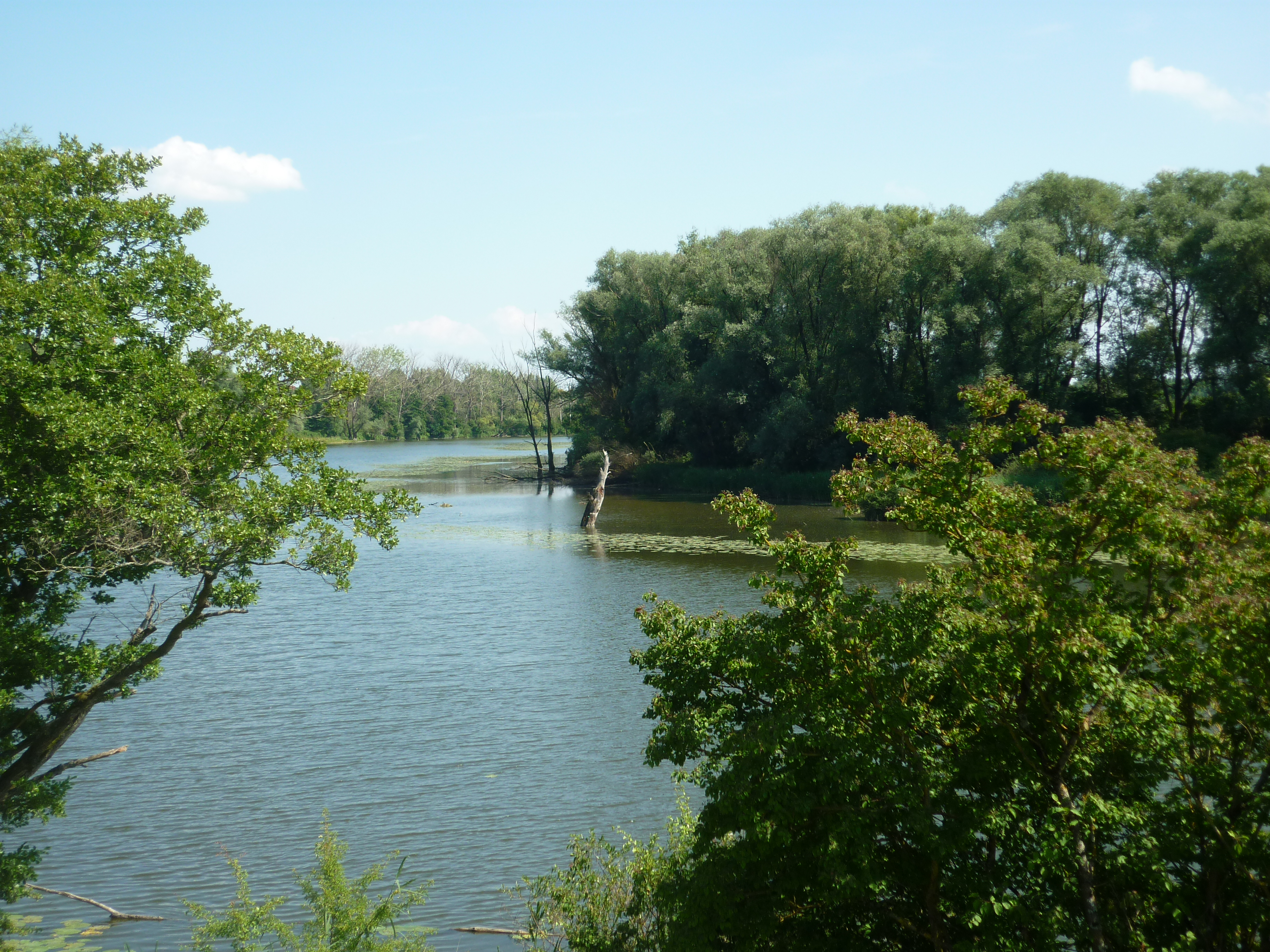 Donaualtwasser Wörth an der Donau Mündungsgebiet der Wiesent